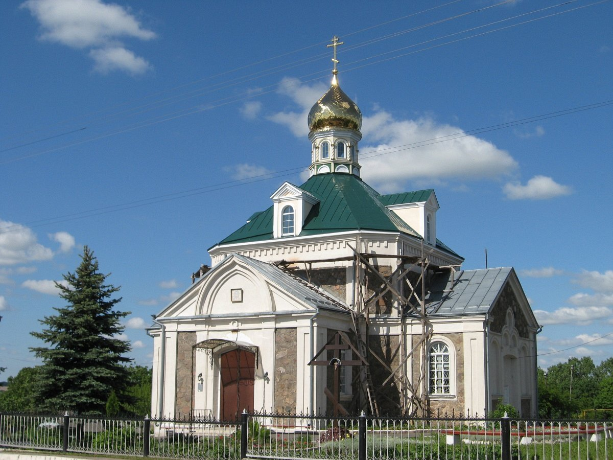 Капыль. Свята-Узнясенская царква